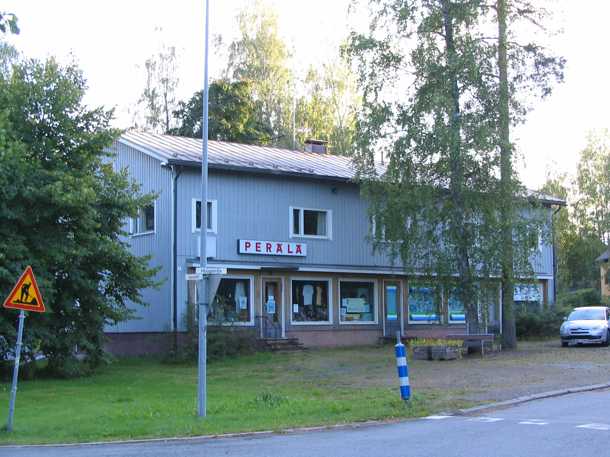 Perälä's museumshop at Lehtisaari, Säynätsalo, Finland (more info in finnish)